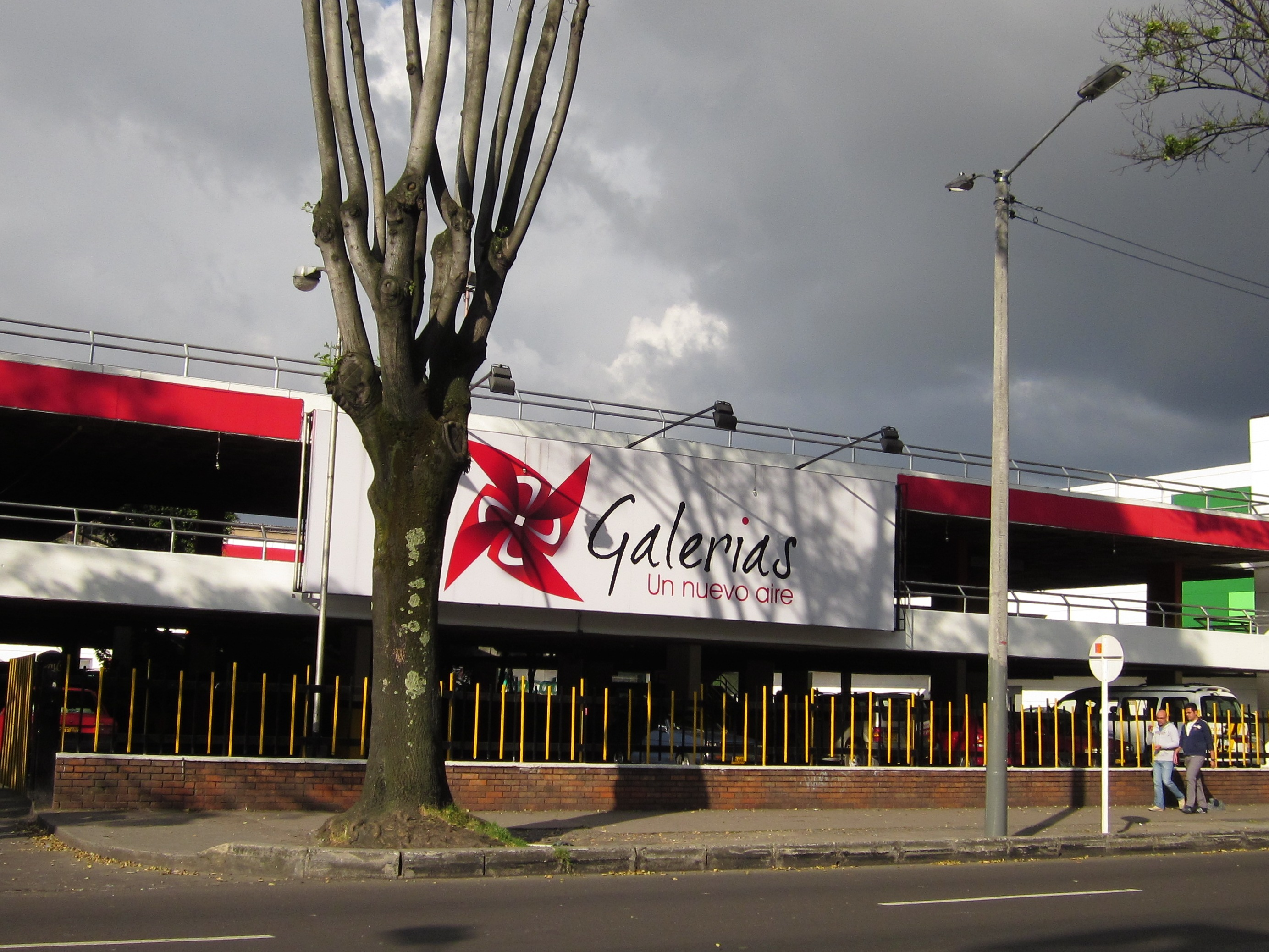 Acceso suroriental al Centro Comercial Galerías, calle 54 #25-81. Barrio, Galerías. Localidad, Teusaquillo. Bogotá.